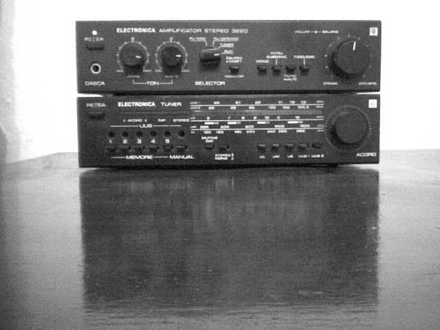 o poza facuta cu un telefon mobil sony ericsson K310i a statiei mele